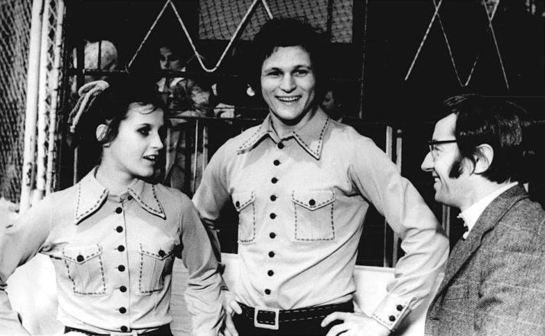 Manuela Groß, Uwe Kagelmann, Heinz Lindner ADN-ZB Mittelstädt 12.1.1974 Berlin: DDR-Meisterschaften im Eiskunstlaufen vom 11. bis 13.1.1974 in der Eissporthalle des Sportforums. Freude bei Manuela Groß, Uwe Kagelmann und Trainer Heinz Lindner (v.l. alle SC Dynamo Berlin) über den Titelgewinn im Paarlaufen.